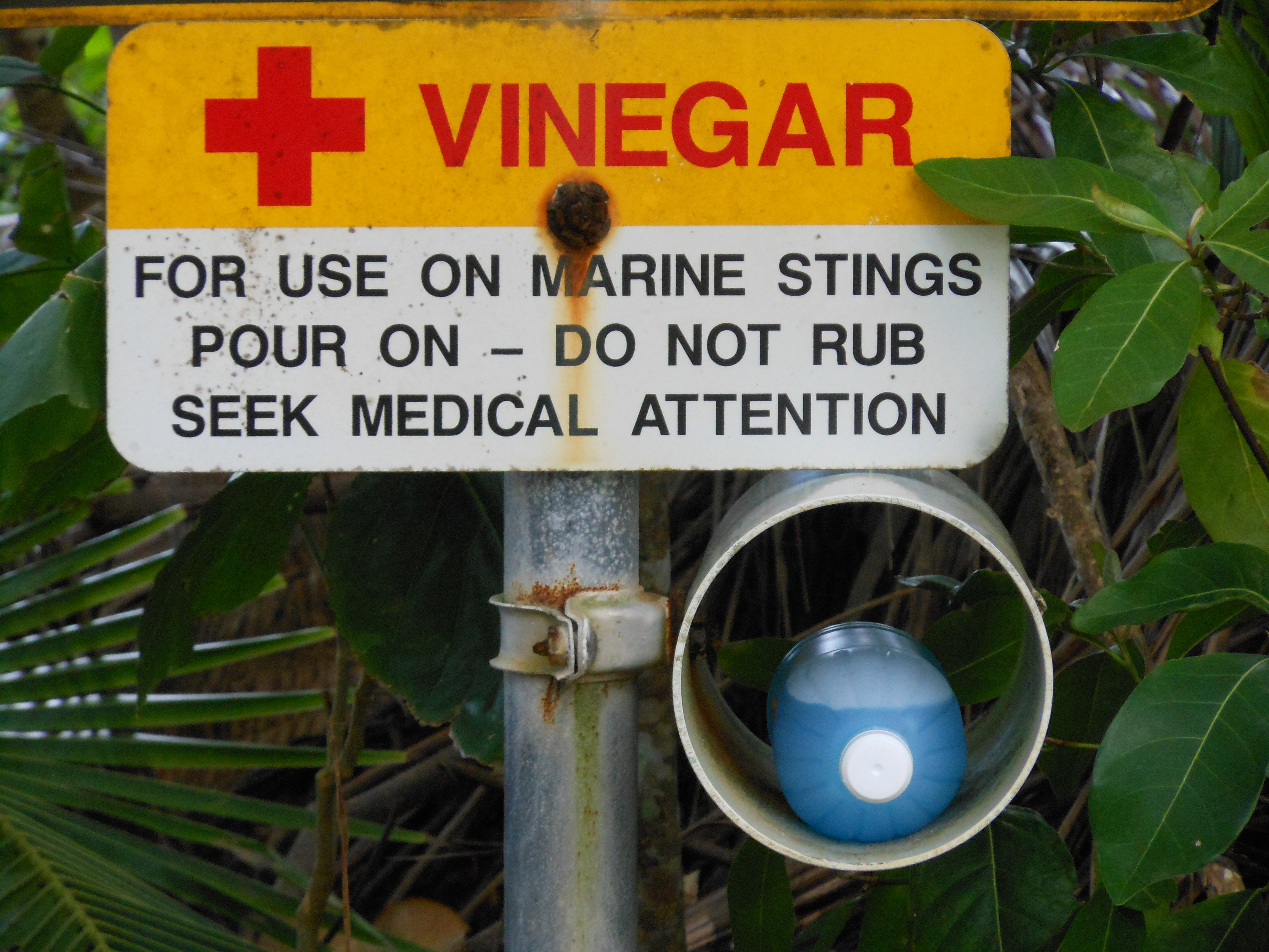 Medicinal Vinegar